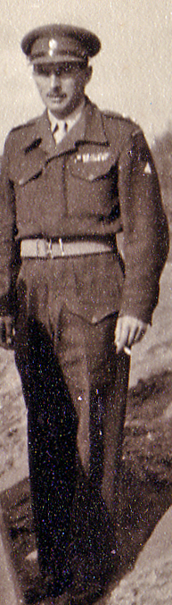 זהו קטע מתמונה קבוצתית המציגה את משתתפי הסיור שנערך לבריגדיר רודני מור ולשלישו הקולונל סטיל ביישובי הארץ.